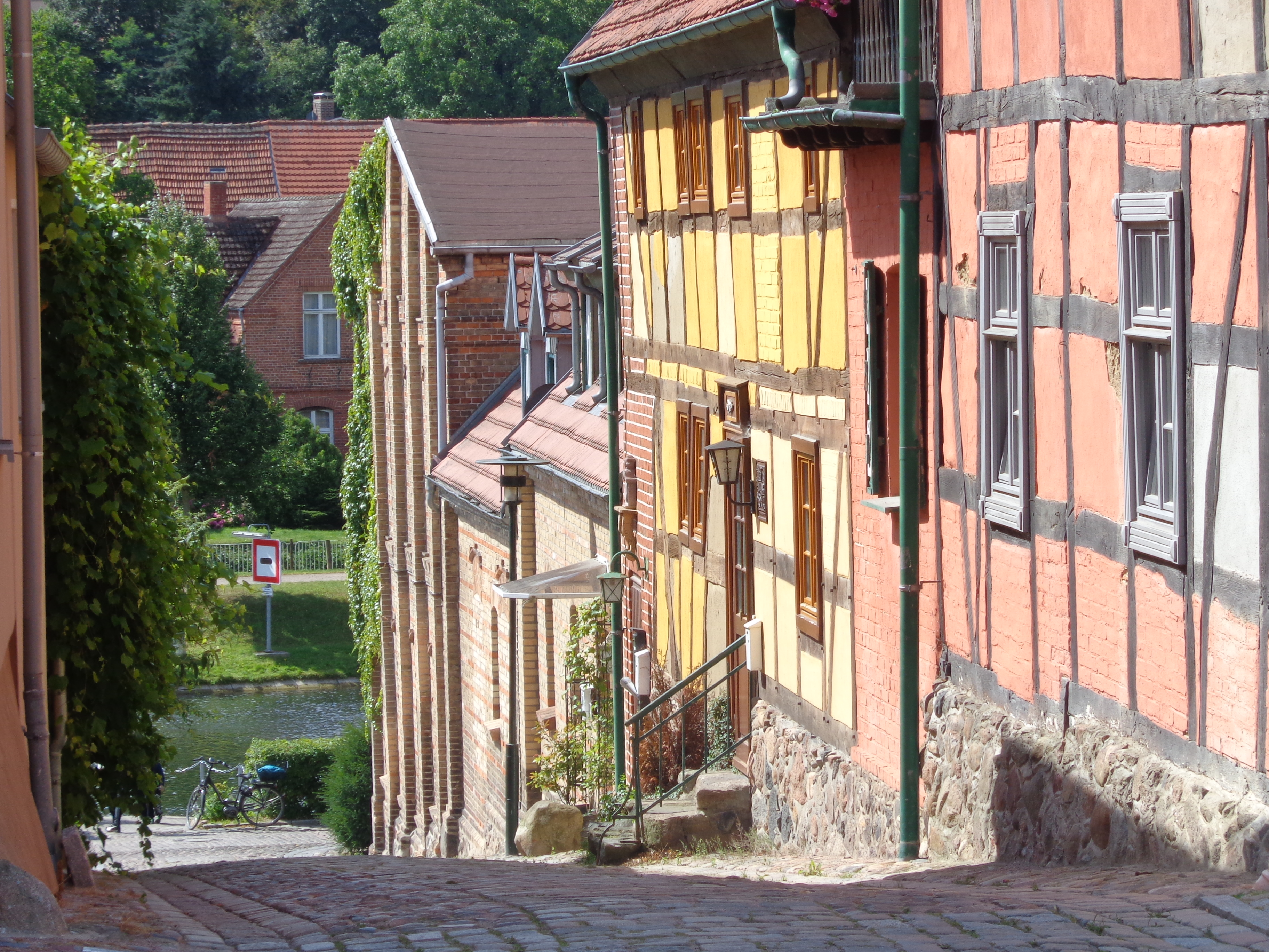 4. Wasserstraße zwischen Marktplatz und Elde in Plau am See.